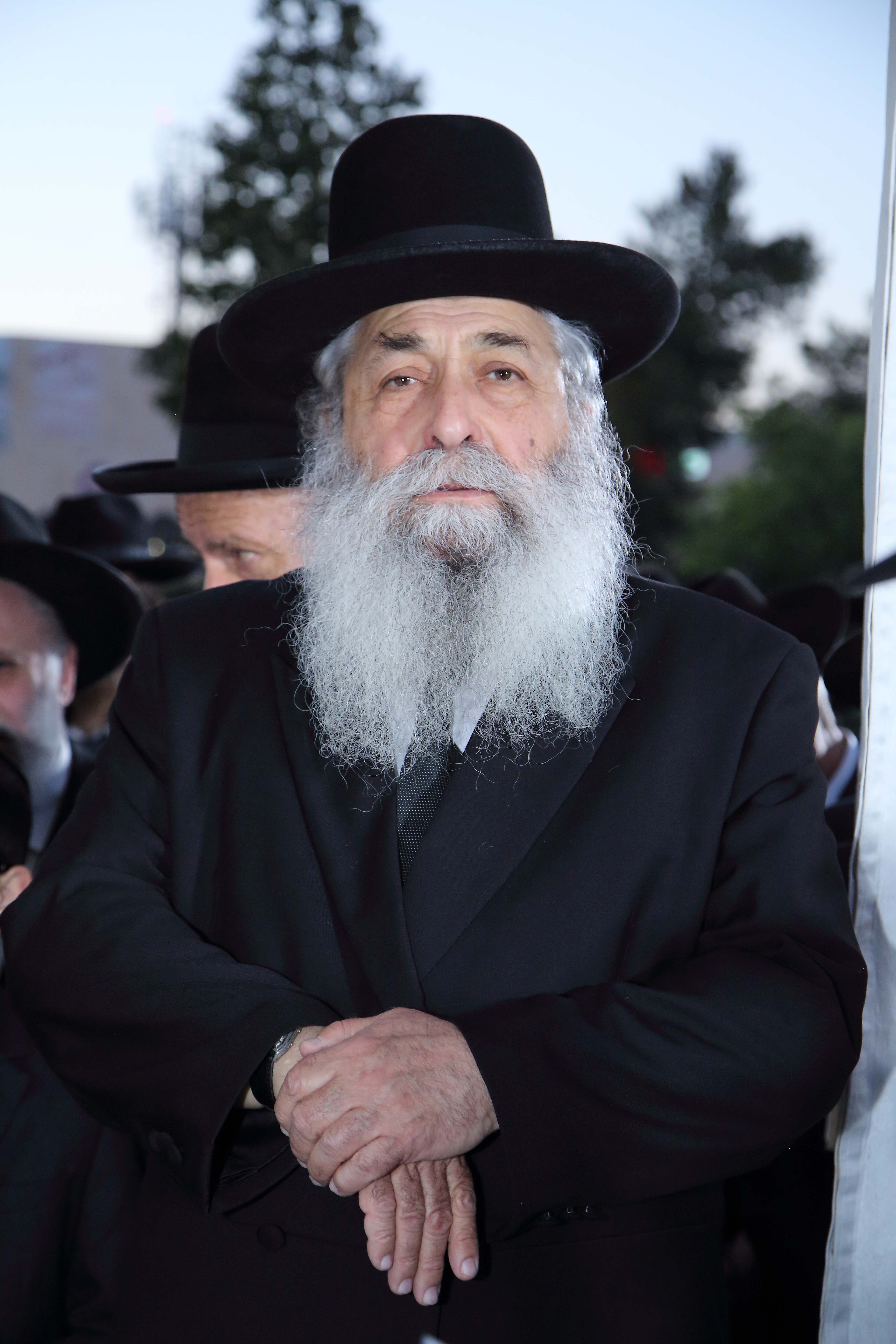 ראש ישיבת אור אלחנן